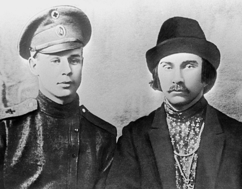 Sergei Yesenin and Nikolai Kljuev